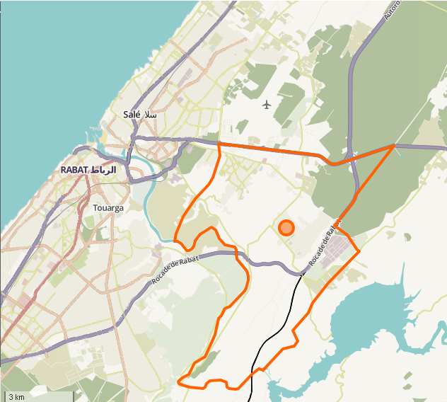 Carte de Hssaine, Salé, Maroc. Limites géographiques de la carte : N : 34.1061 E : -6.8469 W : -6.6807 S : 33.926